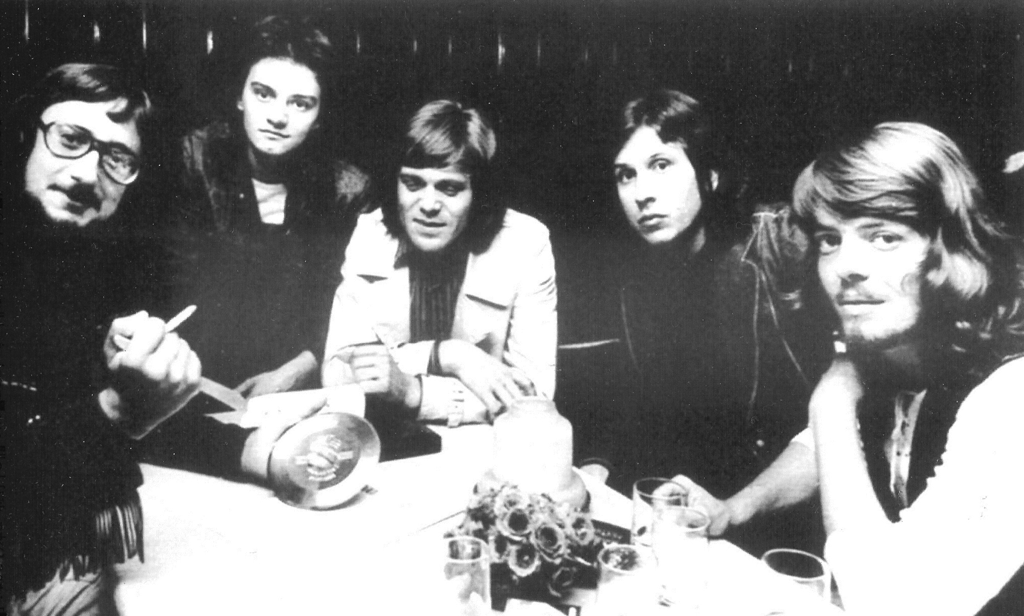 Foto di Amos Amaranti con i Nomadi durante il periodo di Io Vagabondo Licensing Foto di Amos Amaranti (secondo a sinistra)con i Nomadi scattata con loro durante il periodo estate Saint Vincent 72